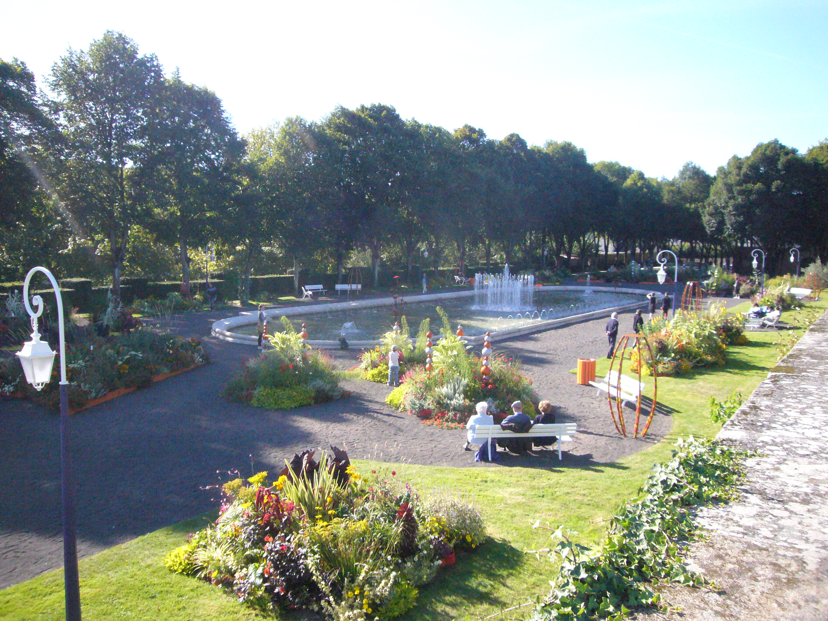 Un des bassins du jardin de l'Évêché de Limoges (Haute-Vienne, France)